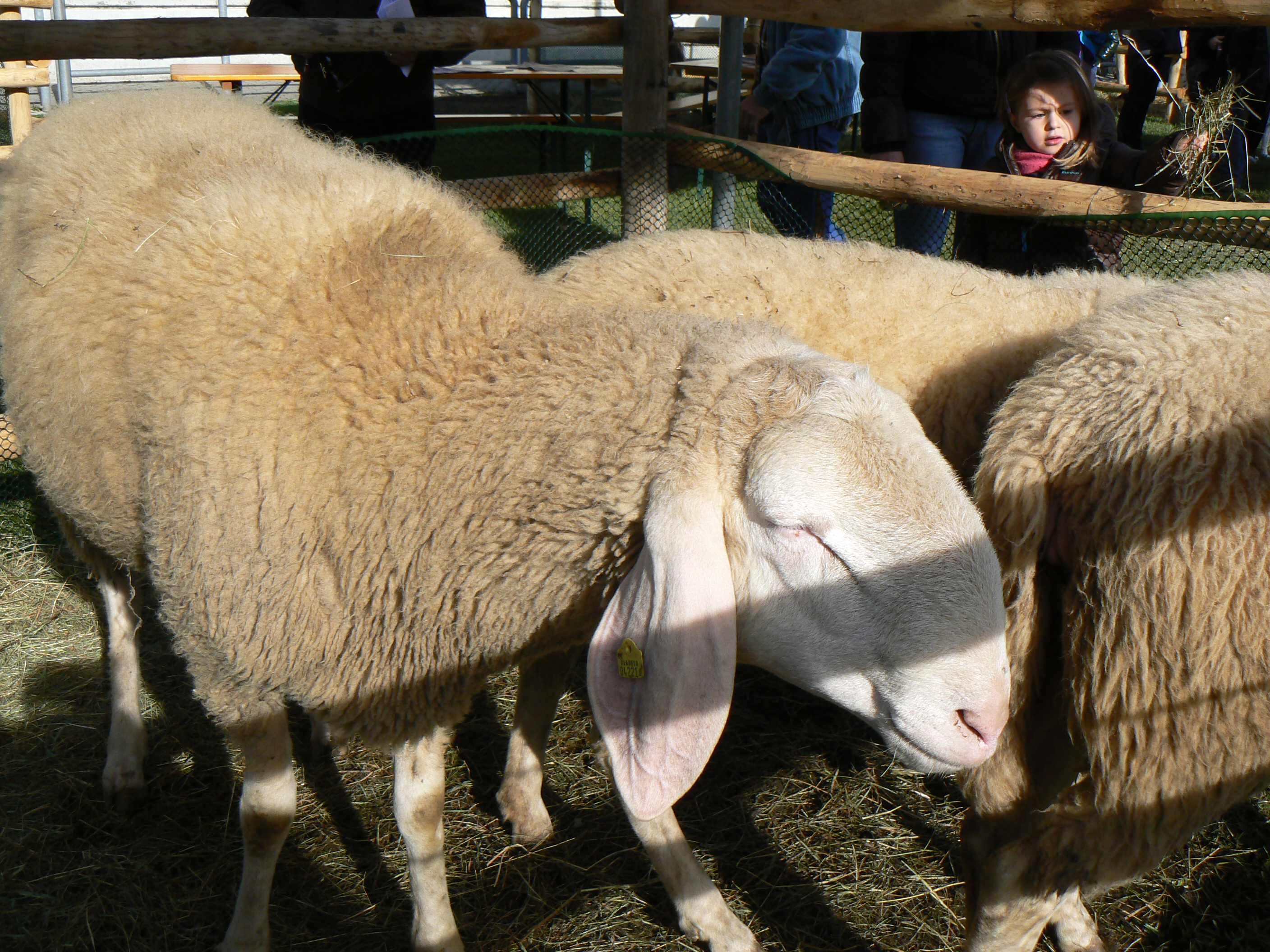 Razza ovina Bergamasca alla Fête des Alpes 2011, ad Aosta.